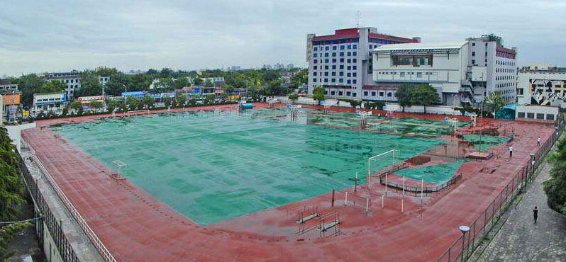 雨后北京四中操场